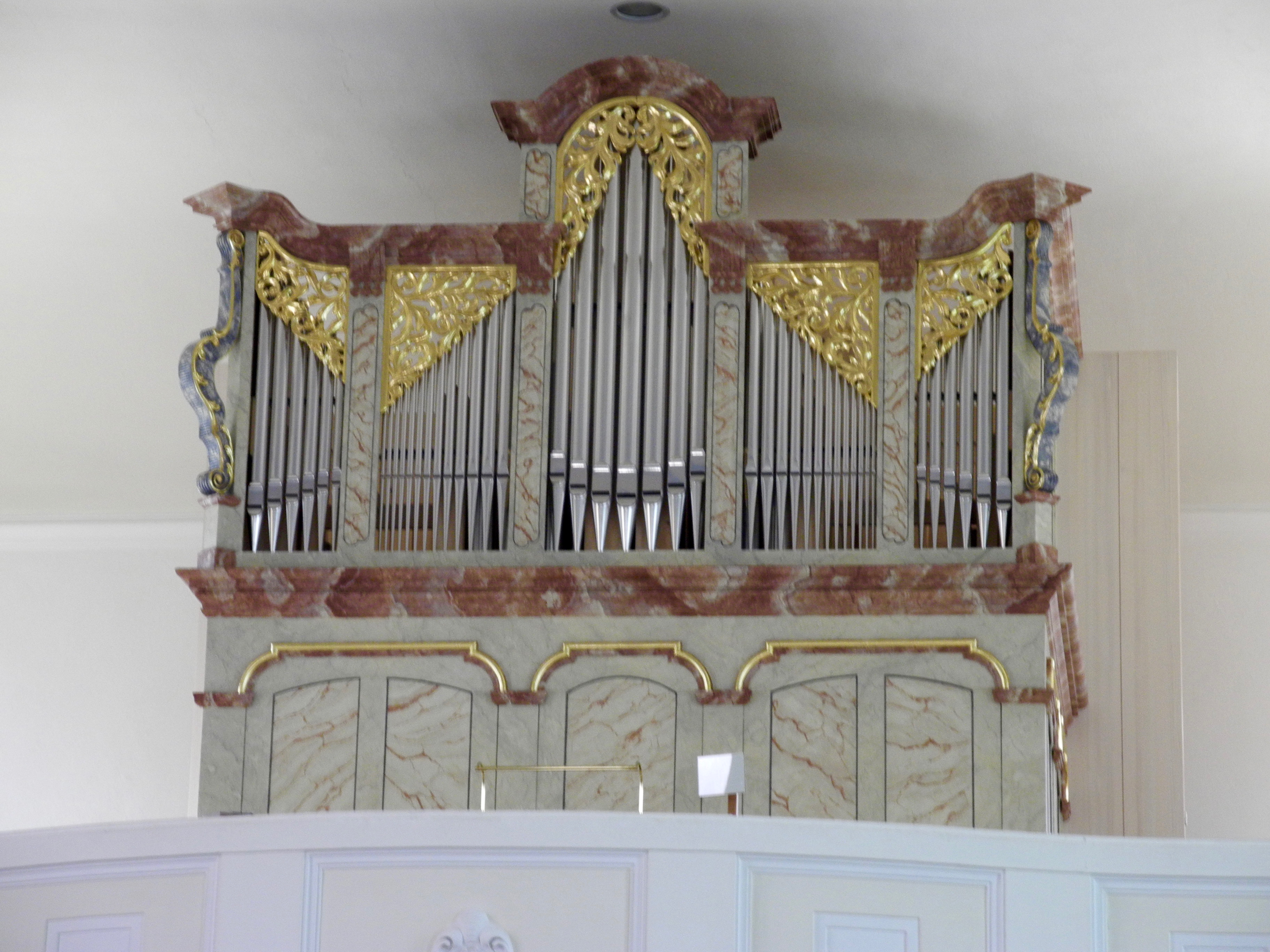 Roggenstein (Vohenstrauß), St. Erhard, Orgel von Wegscheider, Dresden 2011